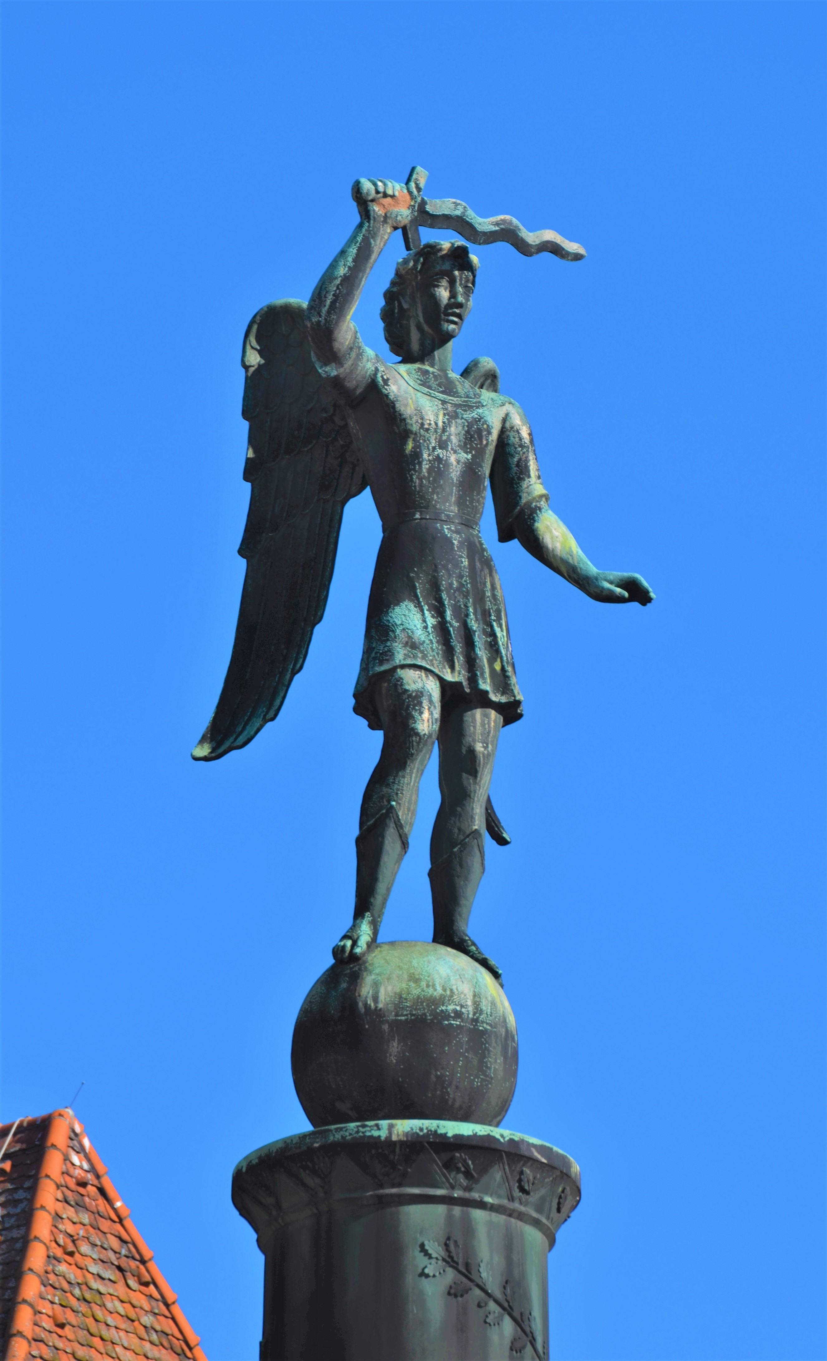 Figur auf den Kriegerdenkmal auf dem Marktplatz von Gmünd